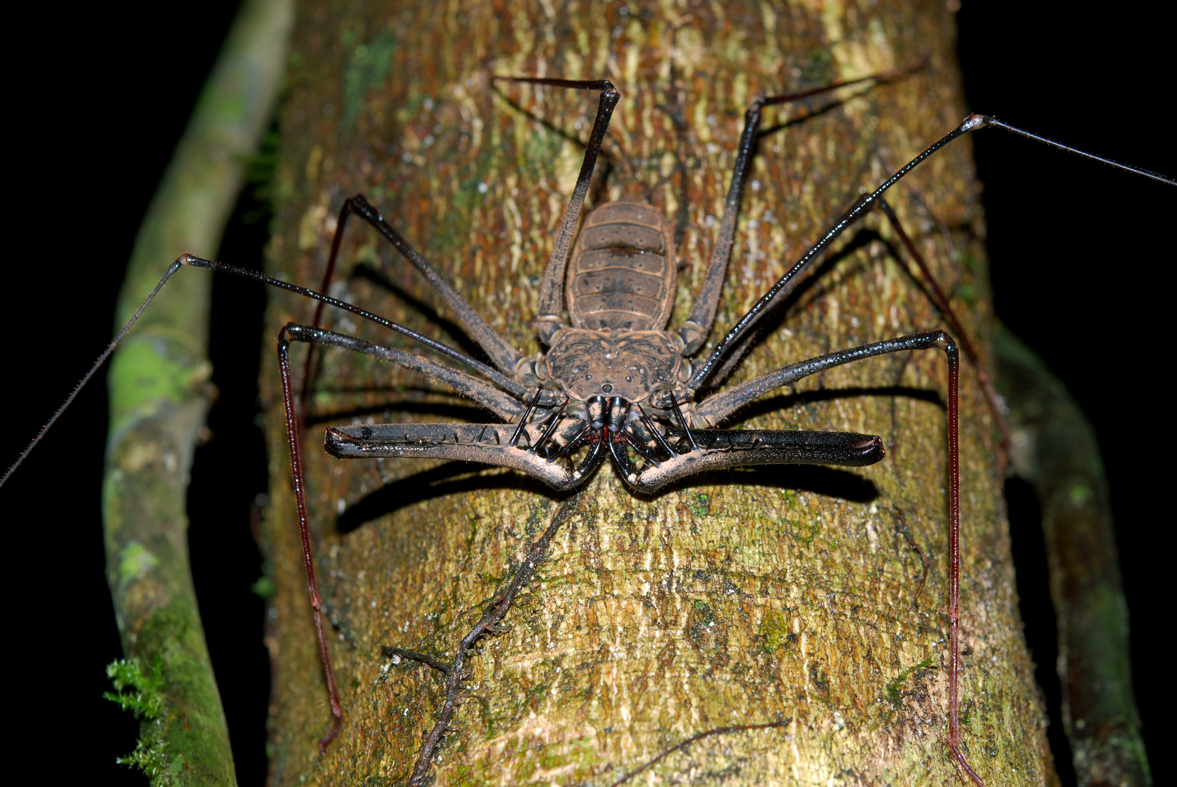 Amblypygi Amazonia, Ecuador